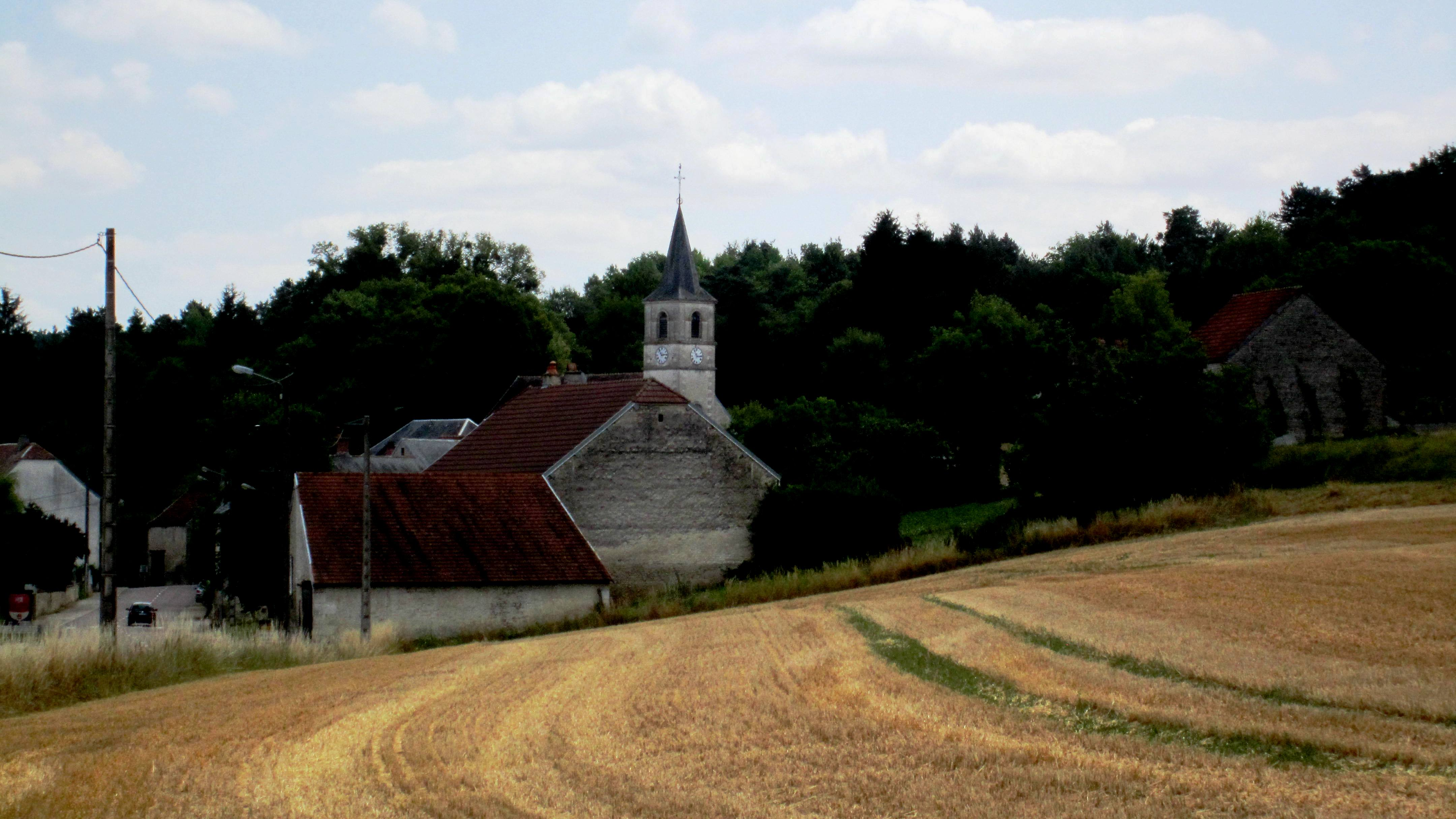 Maisey-le-Duc (Côte-d'Or)